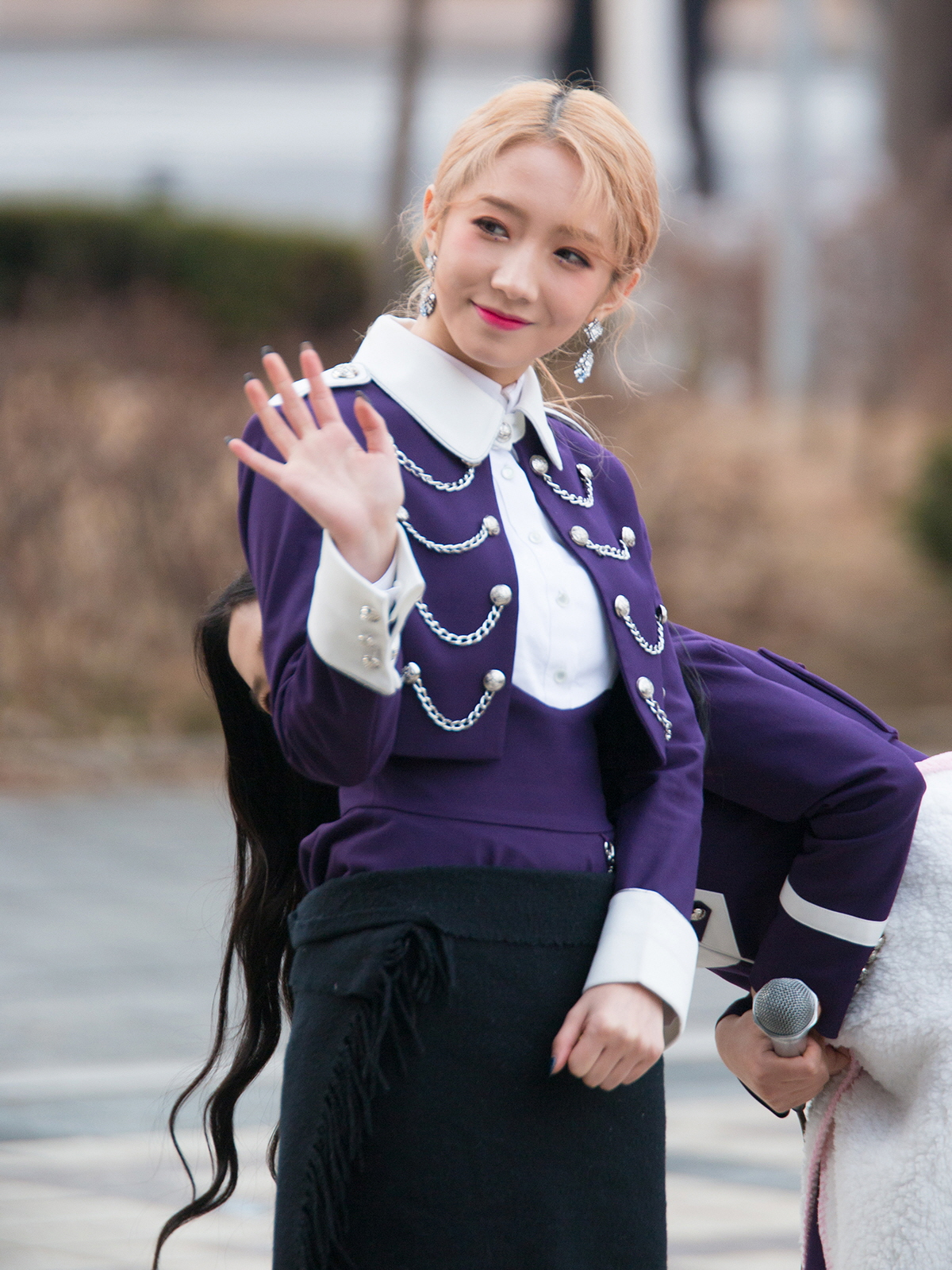 20180317 우주소녀 음악중심 미니 팬미팅